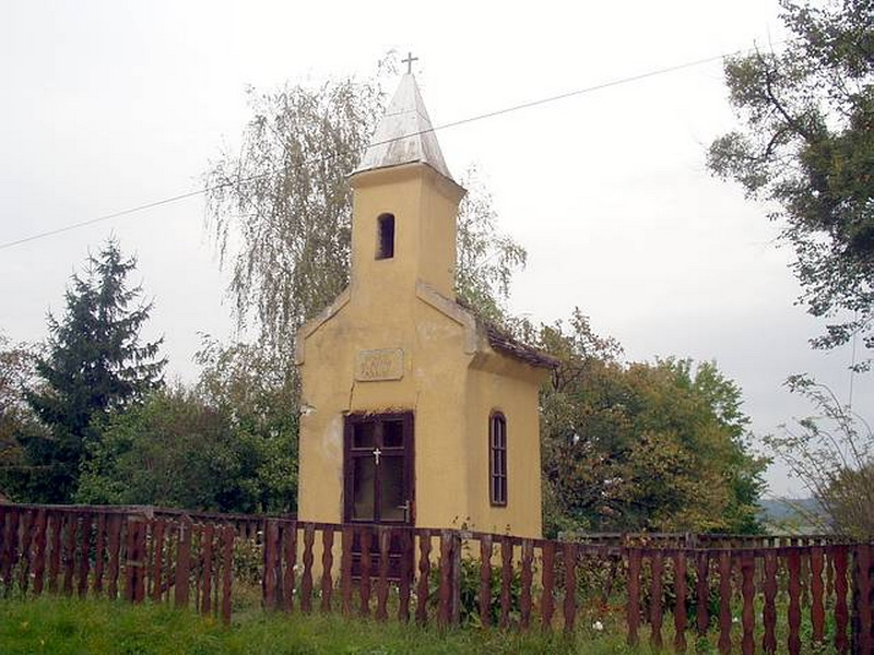 Hudovo - Chapel